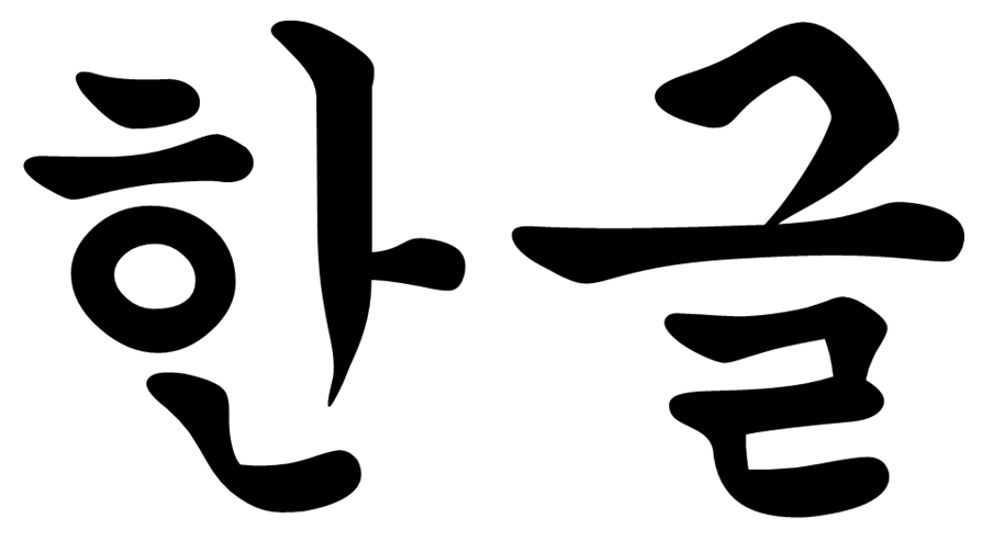 한글 궁서체